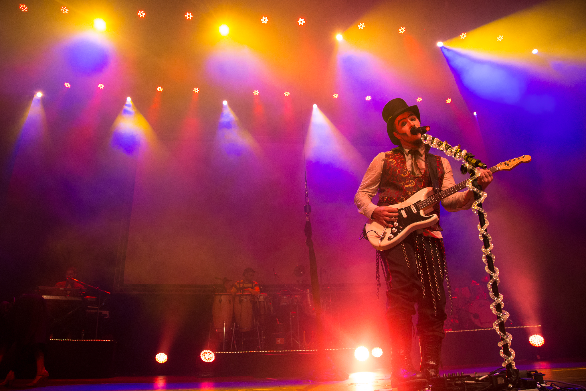 Foto de divulgação